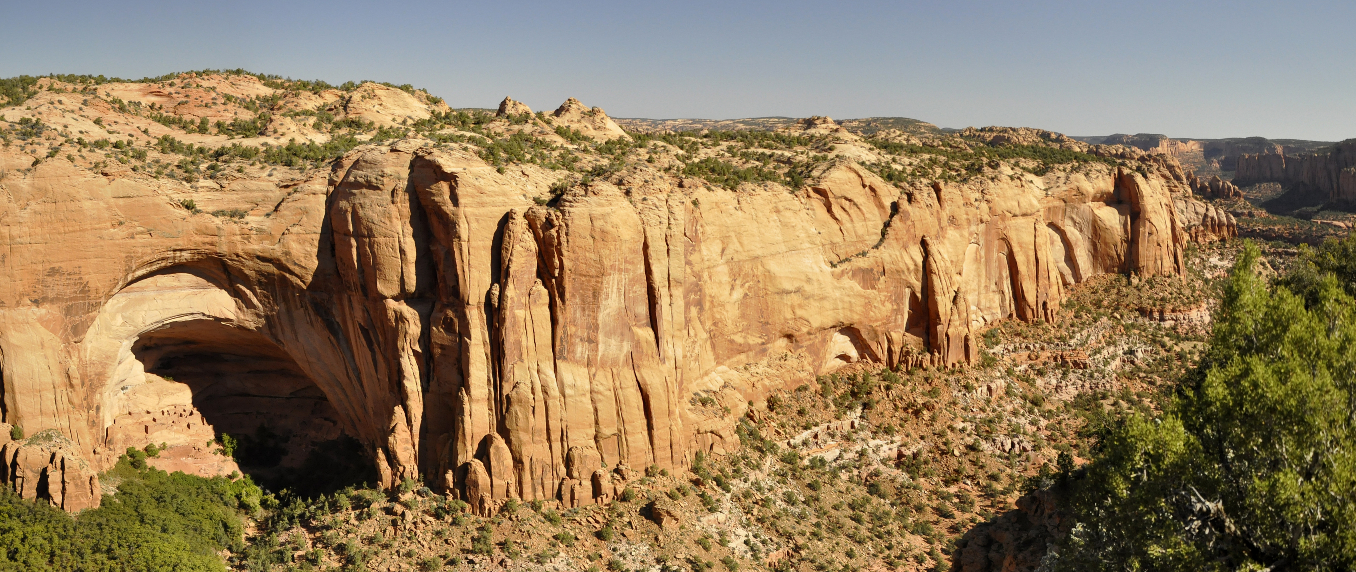 Navajo National Monument - Betatakin Dwelling, Arizona USA